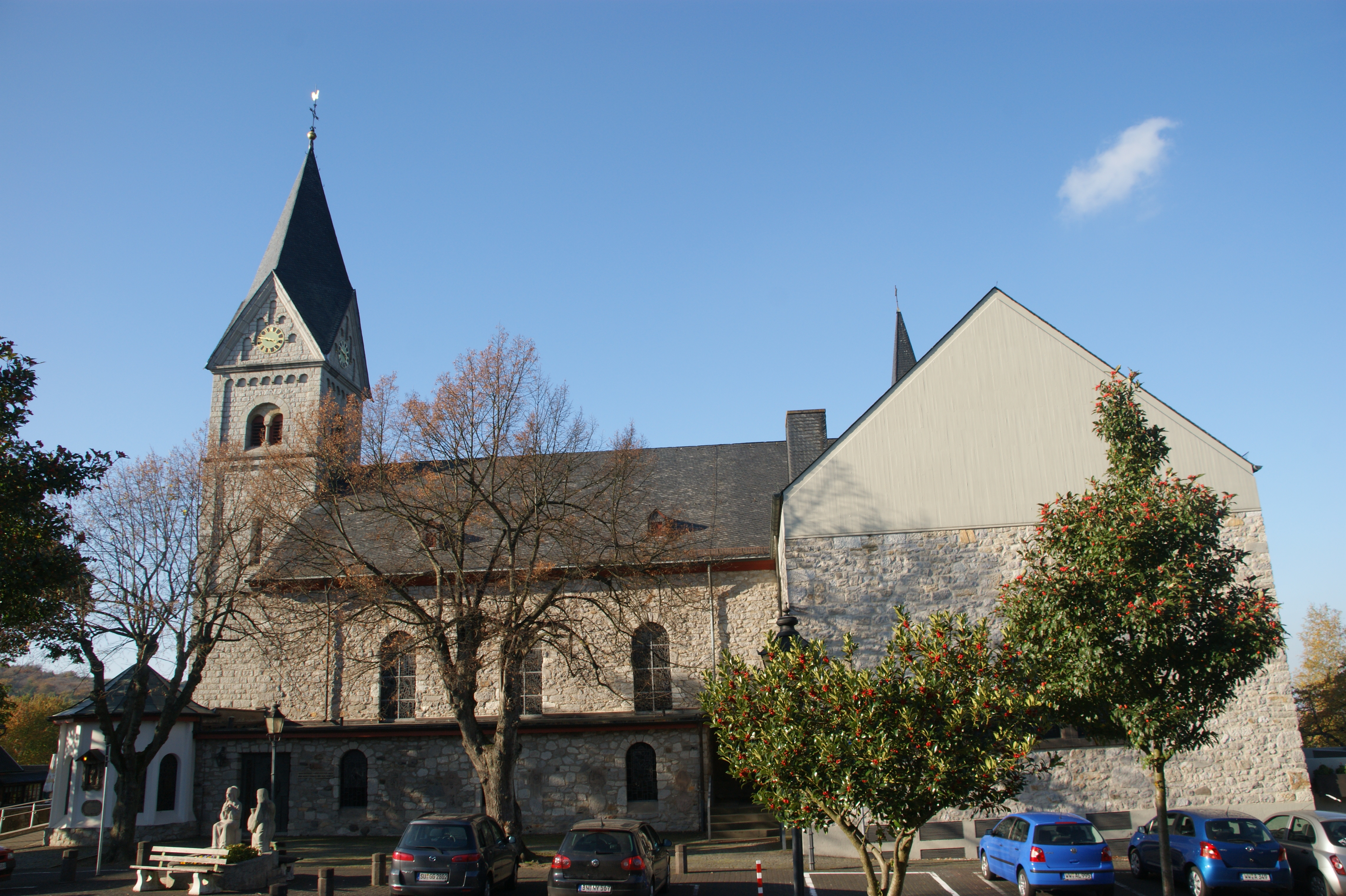 Katholische Kirche „Zur schmerzreichen Mutter“, Ittenbach